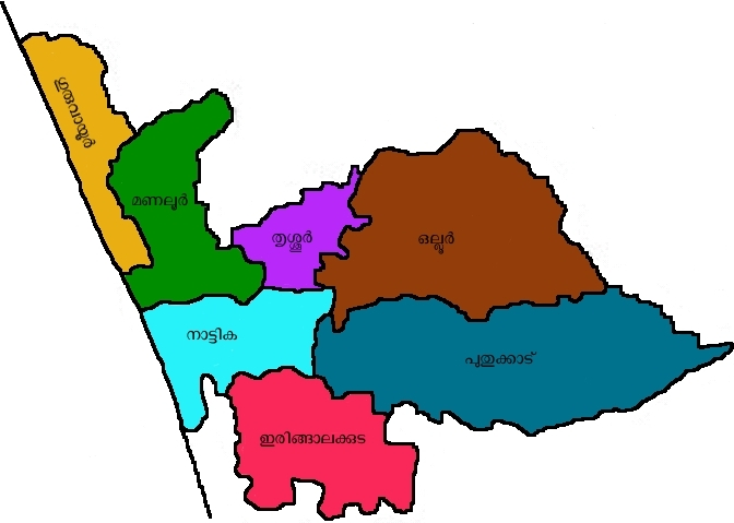 തൃശ്ശൂർ ലോക്സഭാ മണ്ഡലം